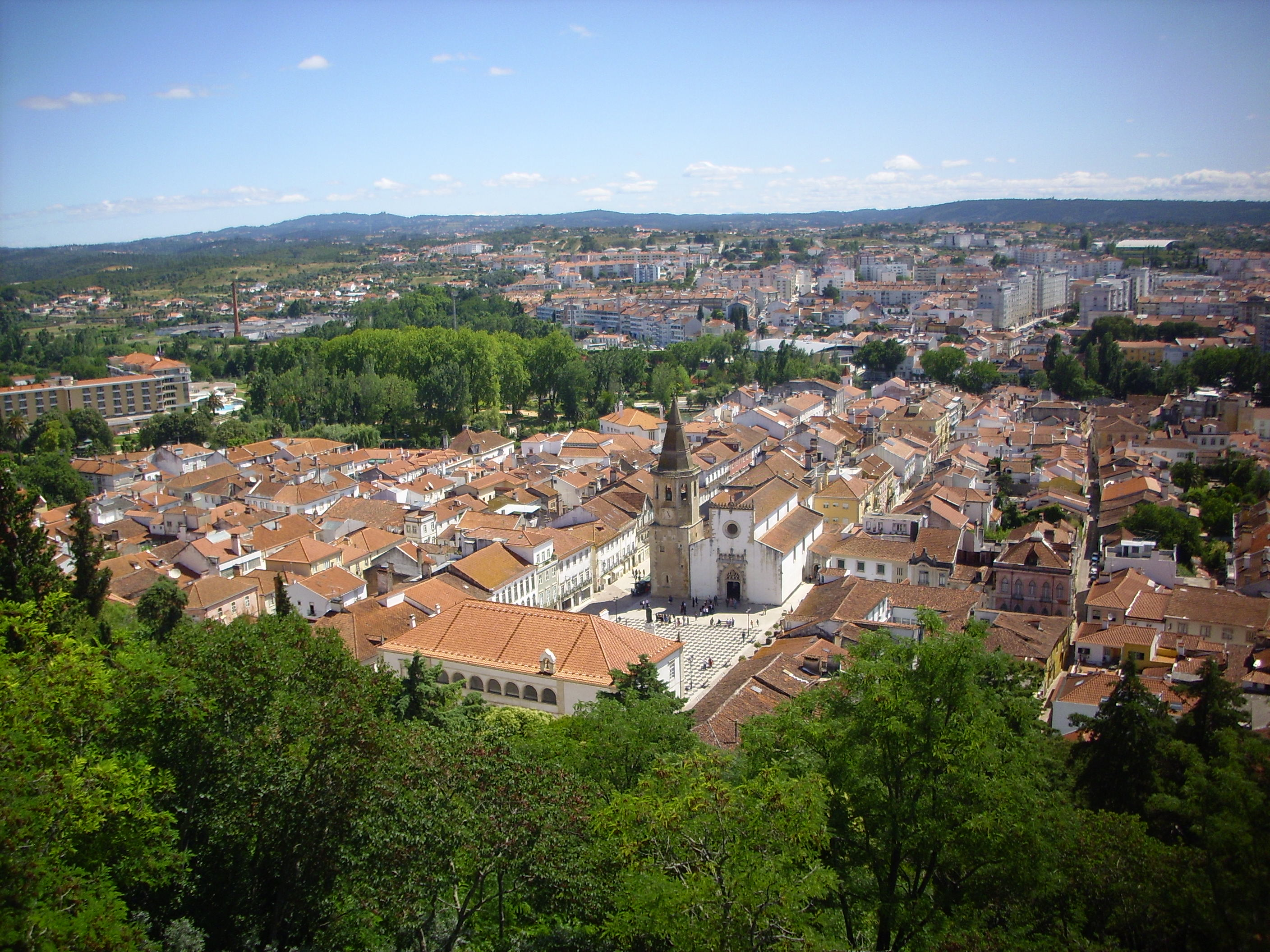 Vista do castelo - Tomar